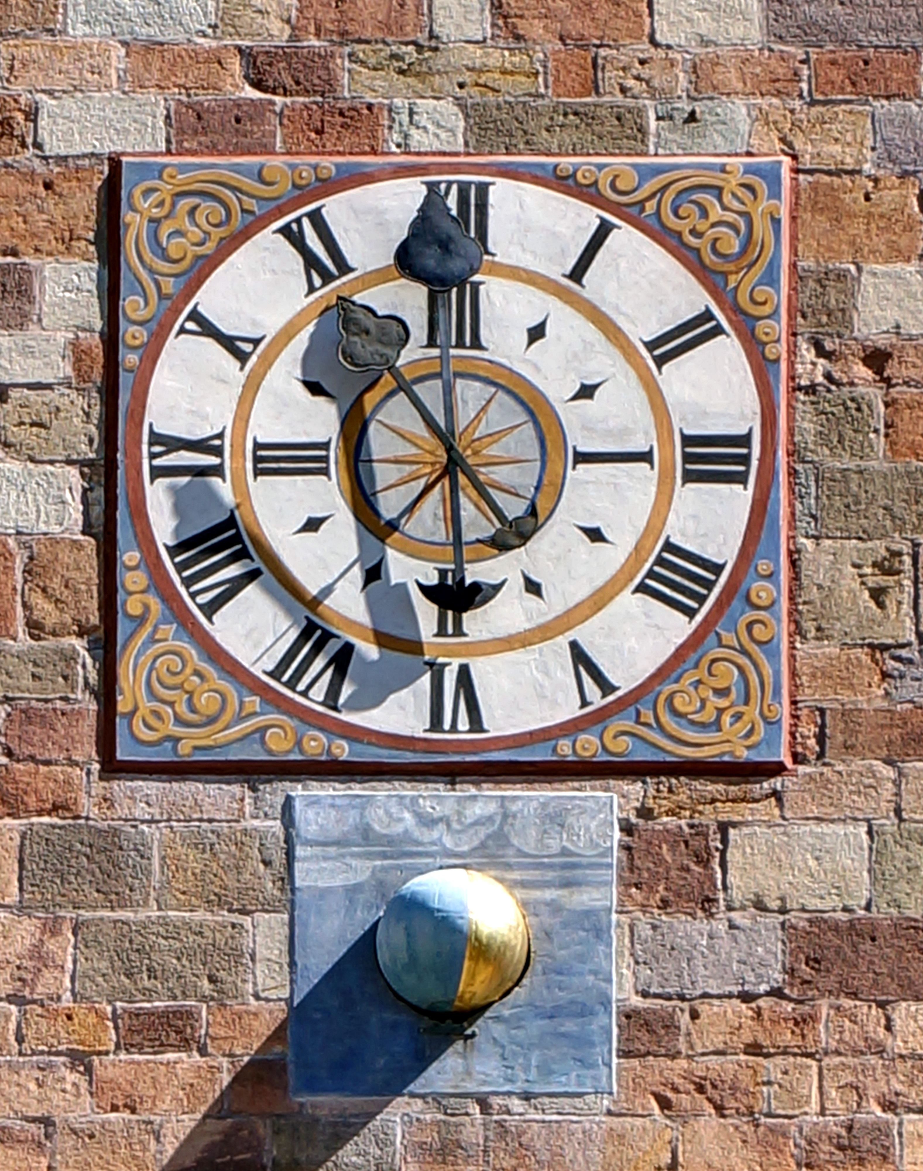 Italien, Südtirol, Terlan, Turmuhr der Pfarrkirche Maria Himmelfahrt, bei der als Besonderheit der längere Zeiger die Stunde und der kürzere die Minuten anzeigt. Die Uhr zeigt 5 Minuten vor 12.00 und nicht 2 Minuten vor 11.00